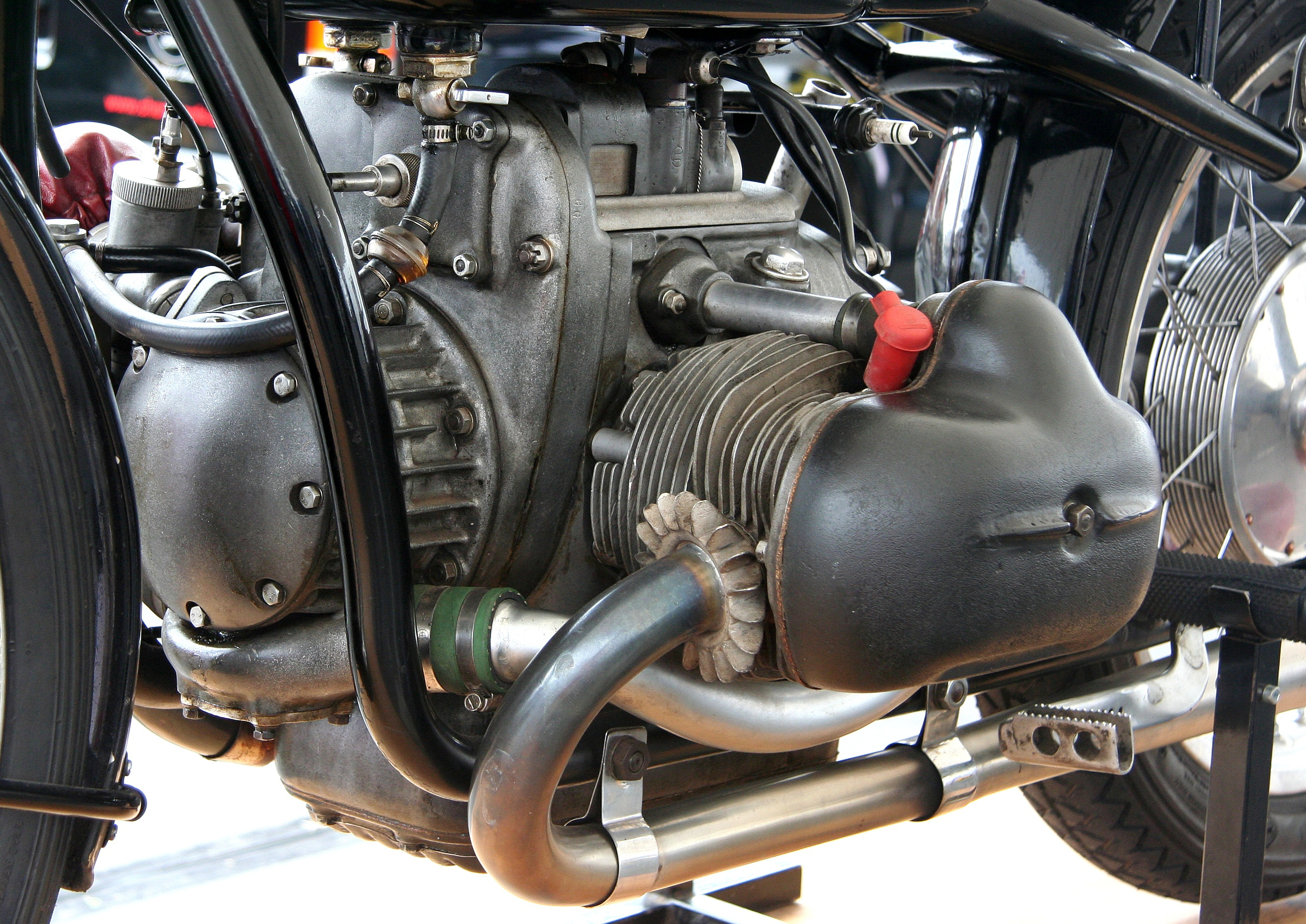 BMW RS 500, Typ 255, 500 cm³ mit Kompressor, Leistung ca. 55–60 PS. Wahrscheinlich die Maschine, die John Surtees besaß. und BMW überließ